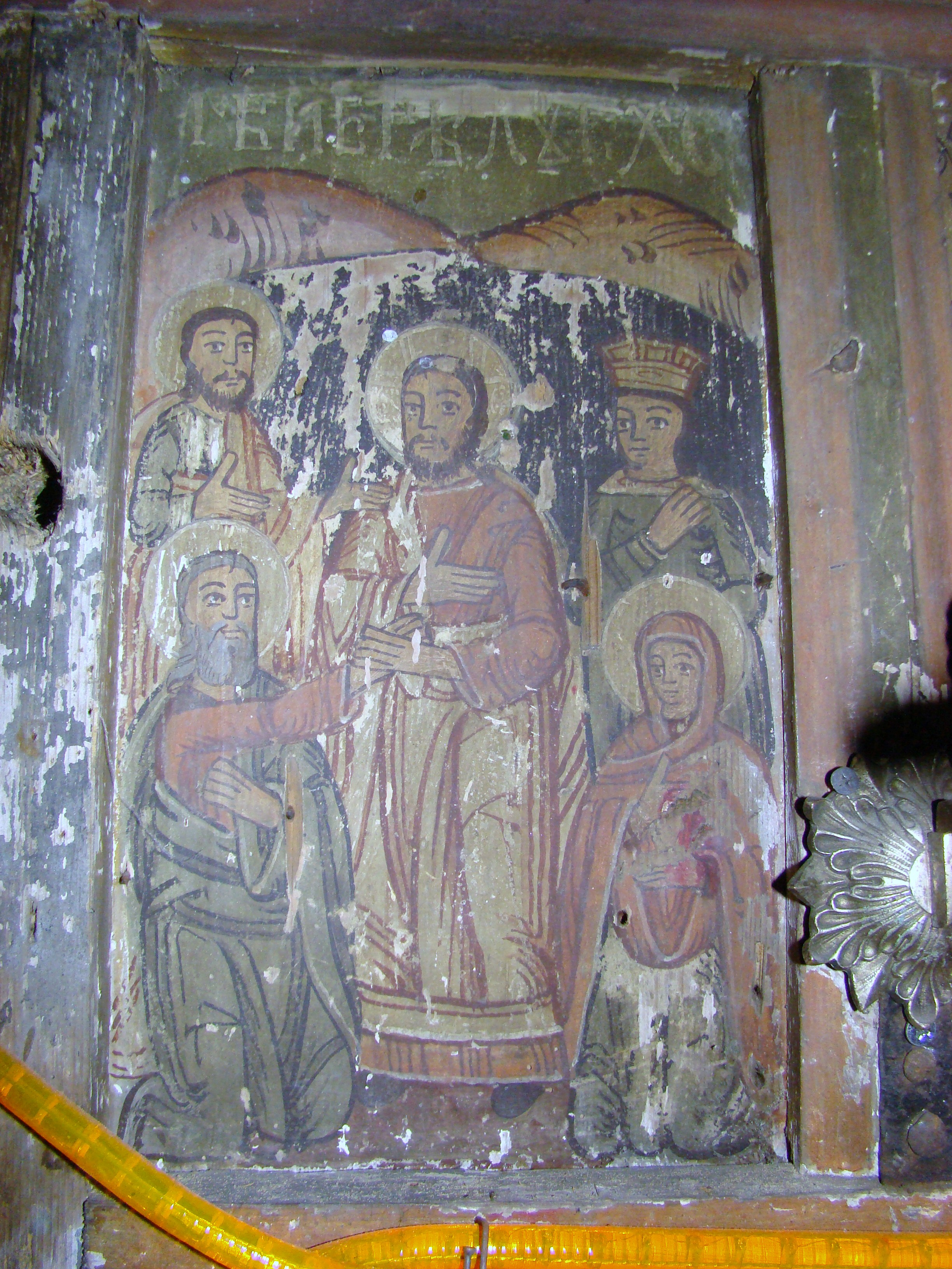 Biserica "Înălţarea Domnului" , sat NUCŞOARA; comuna SĂLAŞU DE SUS